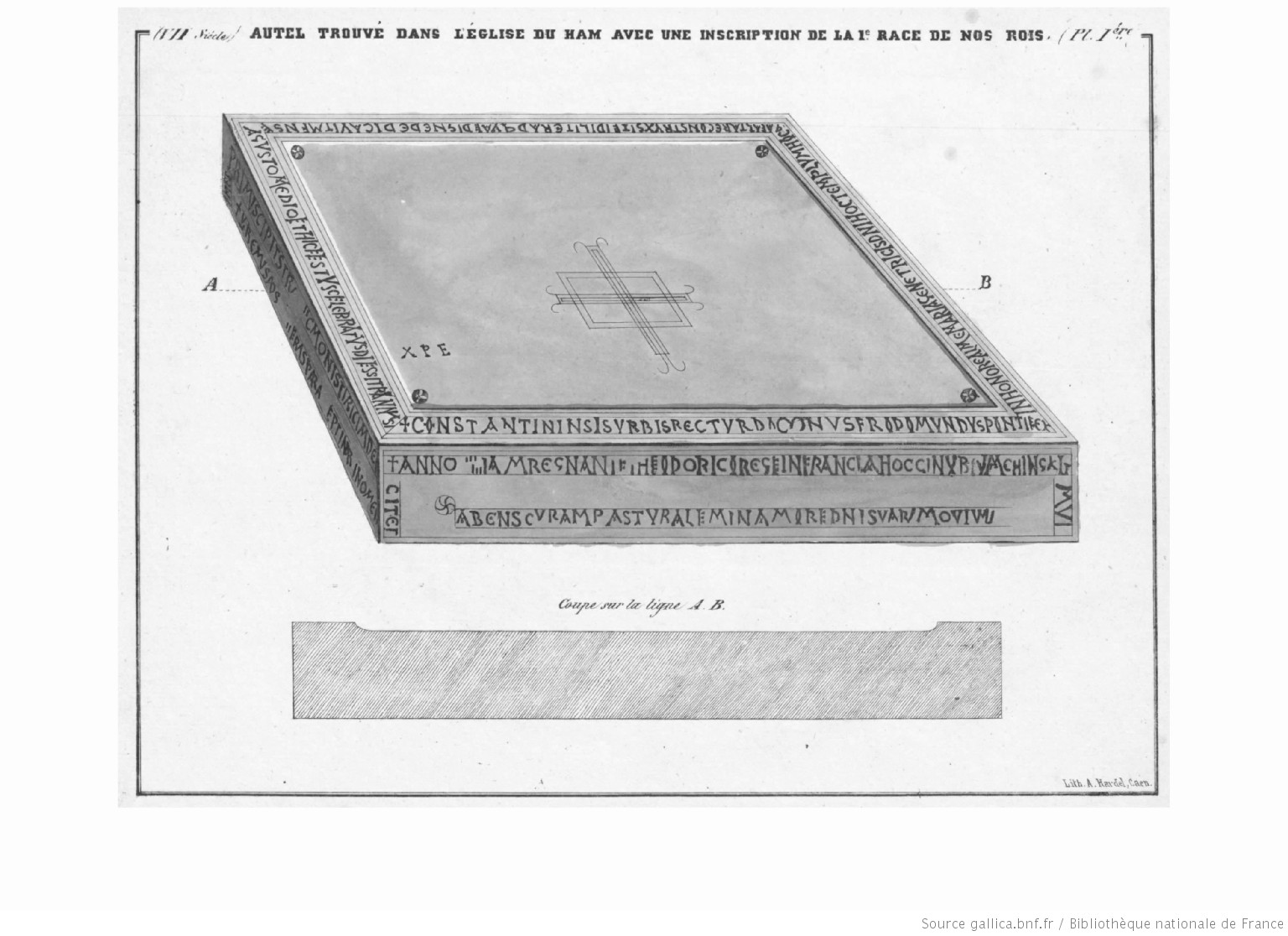 Dessin de l'autel du Ham, mémoire de la société des antiquaires de Normandie, 1847